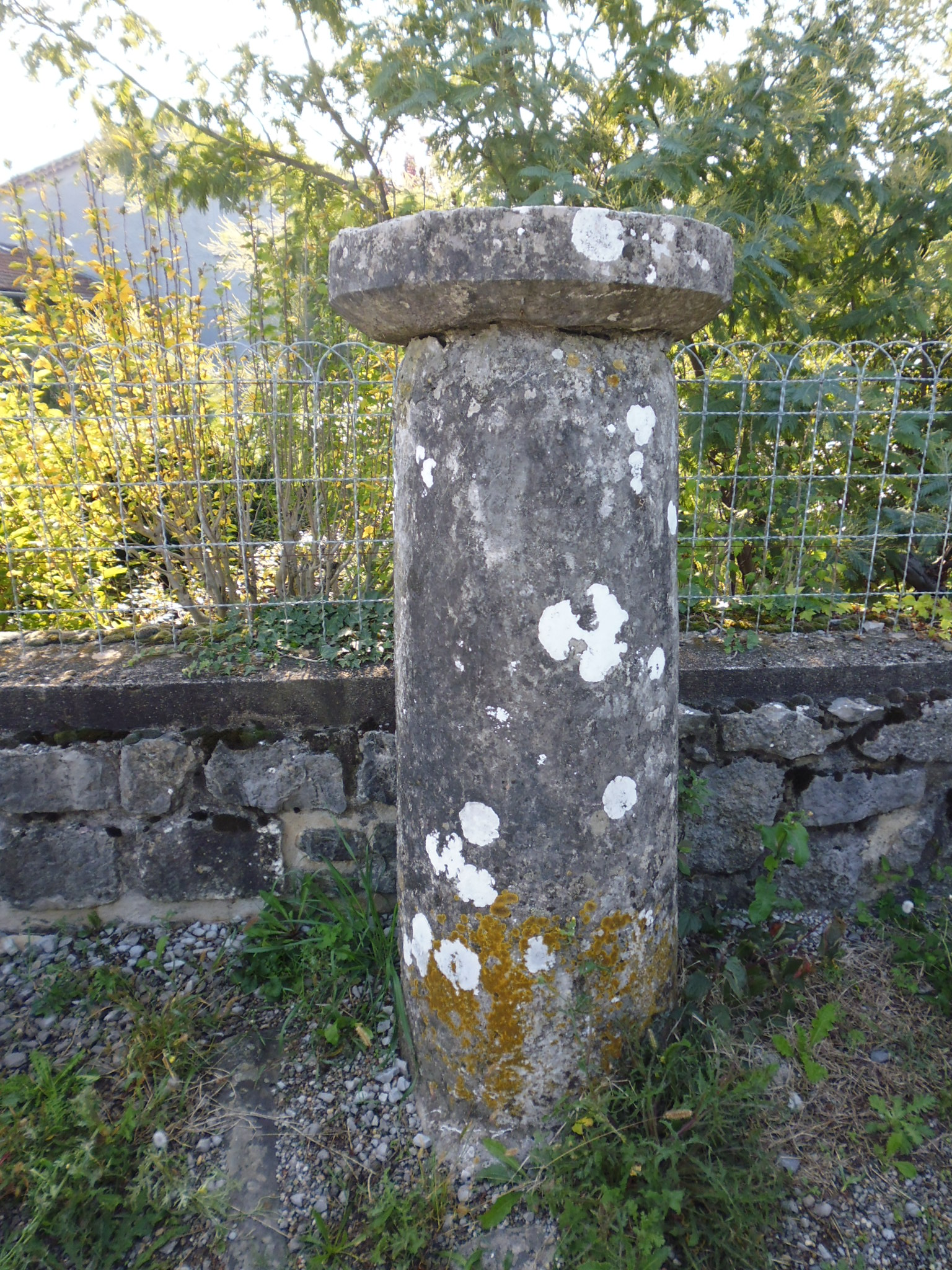 Borne milliaire de Saint-GermainCIL 17-02, 00191